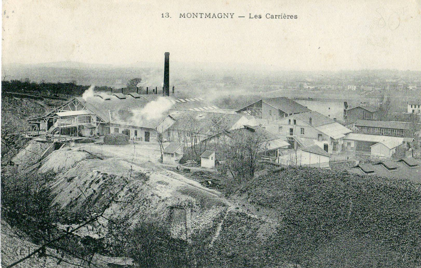 Carte postale ancienne éditée par ELD (N°13) MONTMAGNY : Les carrières